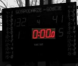 Tablica wyników z wyróżnionym czasem gry